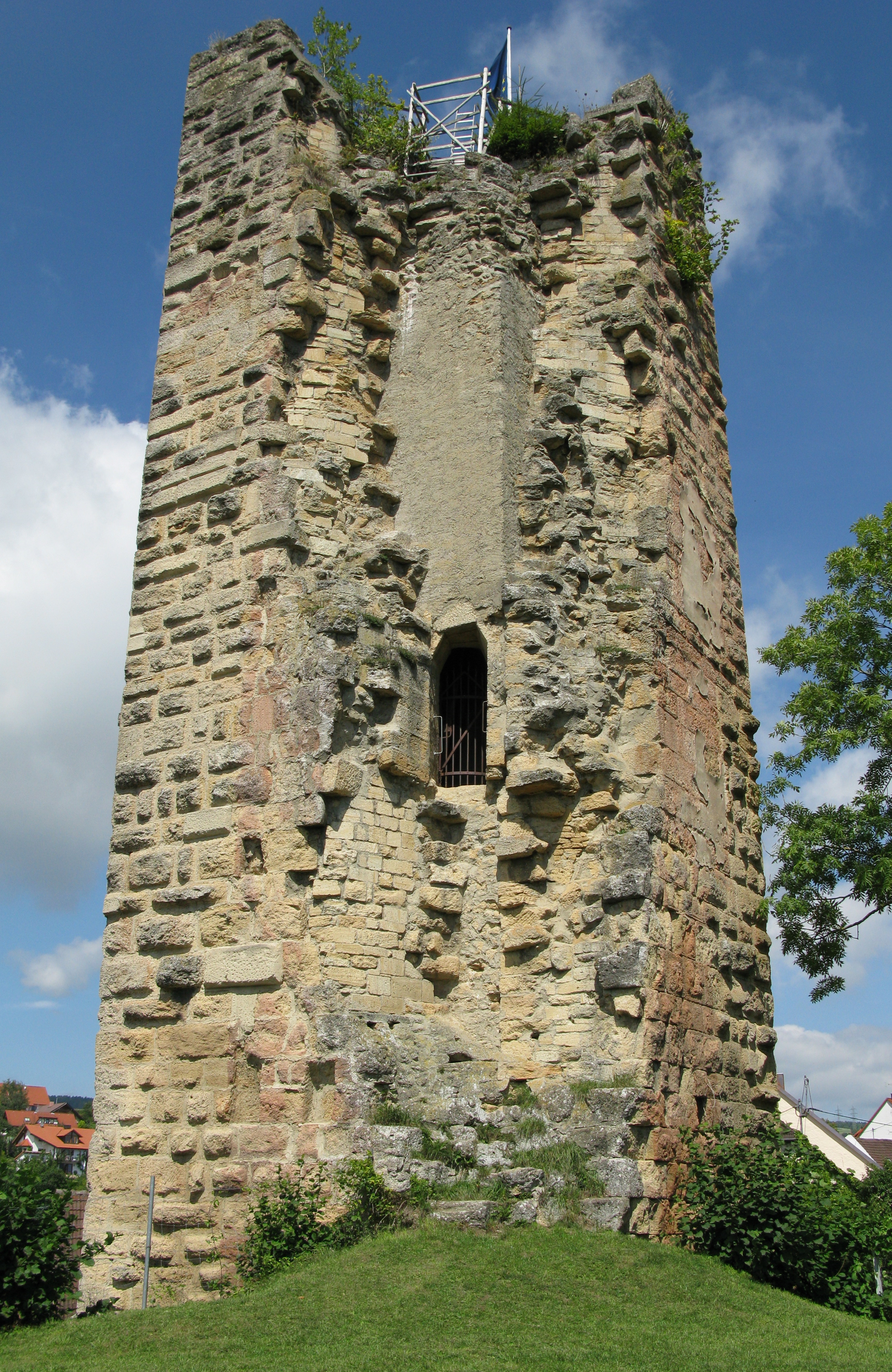 Turmruine des Bergfrieds von Süden mit dem in 3 m Höhe liegenden ehemaligen Eingang.